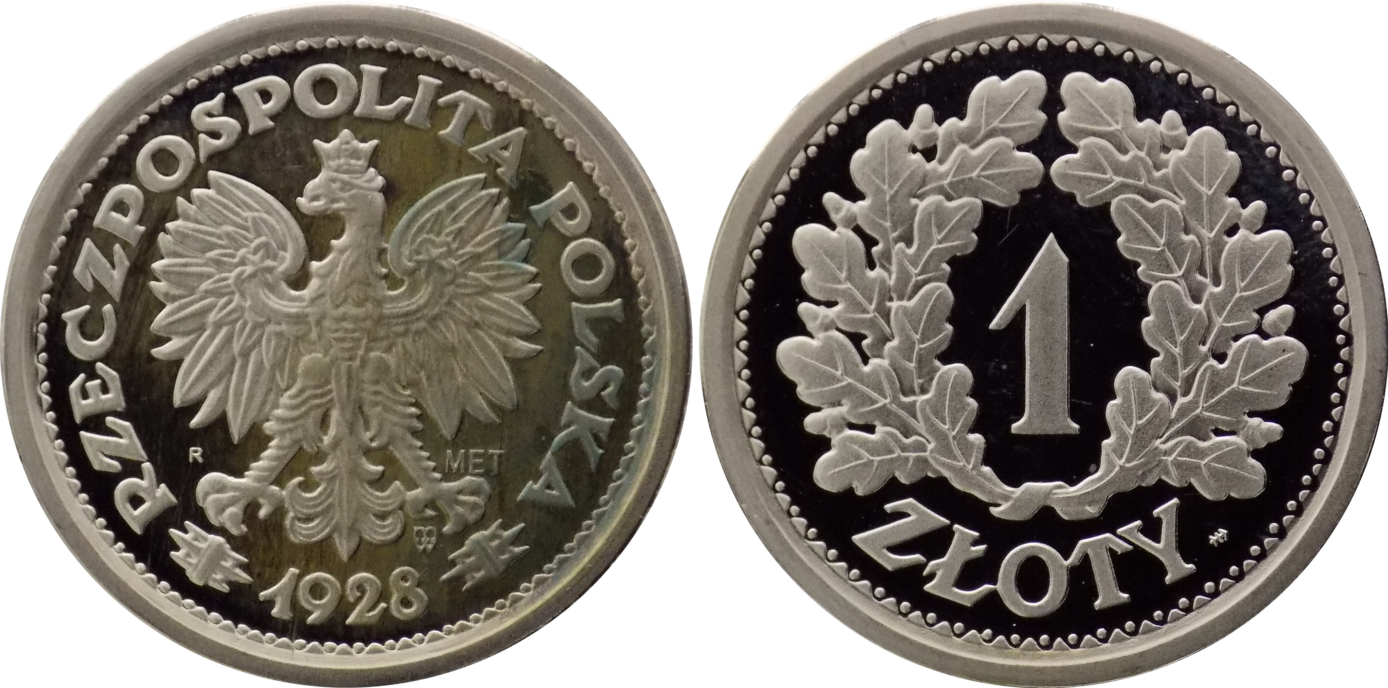 Replika 1 złoty 1928 wieniec z liści dębu